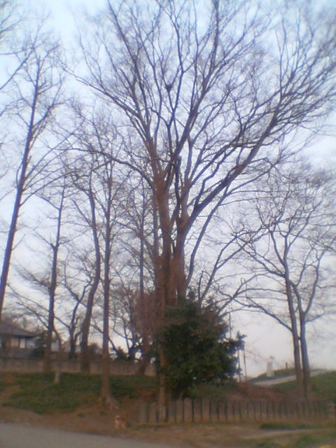 ケヤキの樹形 撮影データ 撮影地: 関東地方、荒川河川敷 撮影年月日: 2005年3月上旬 撮影者: Koba-chan ライセンス: GFDL